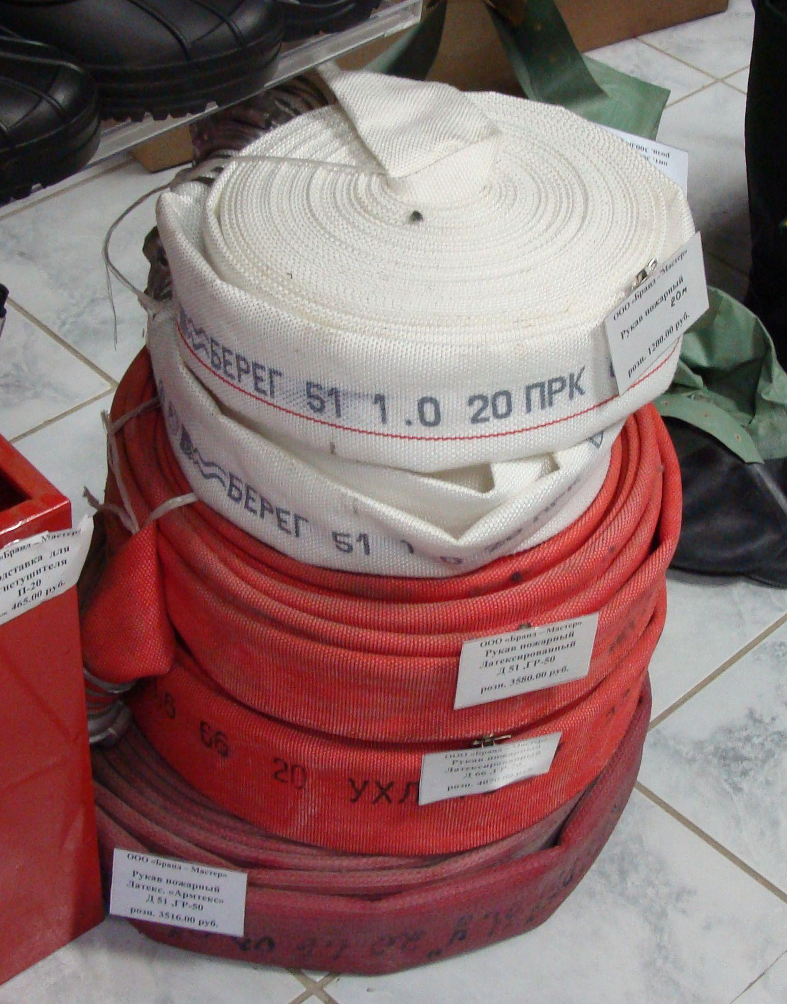 Рукава пожарные с ценниками